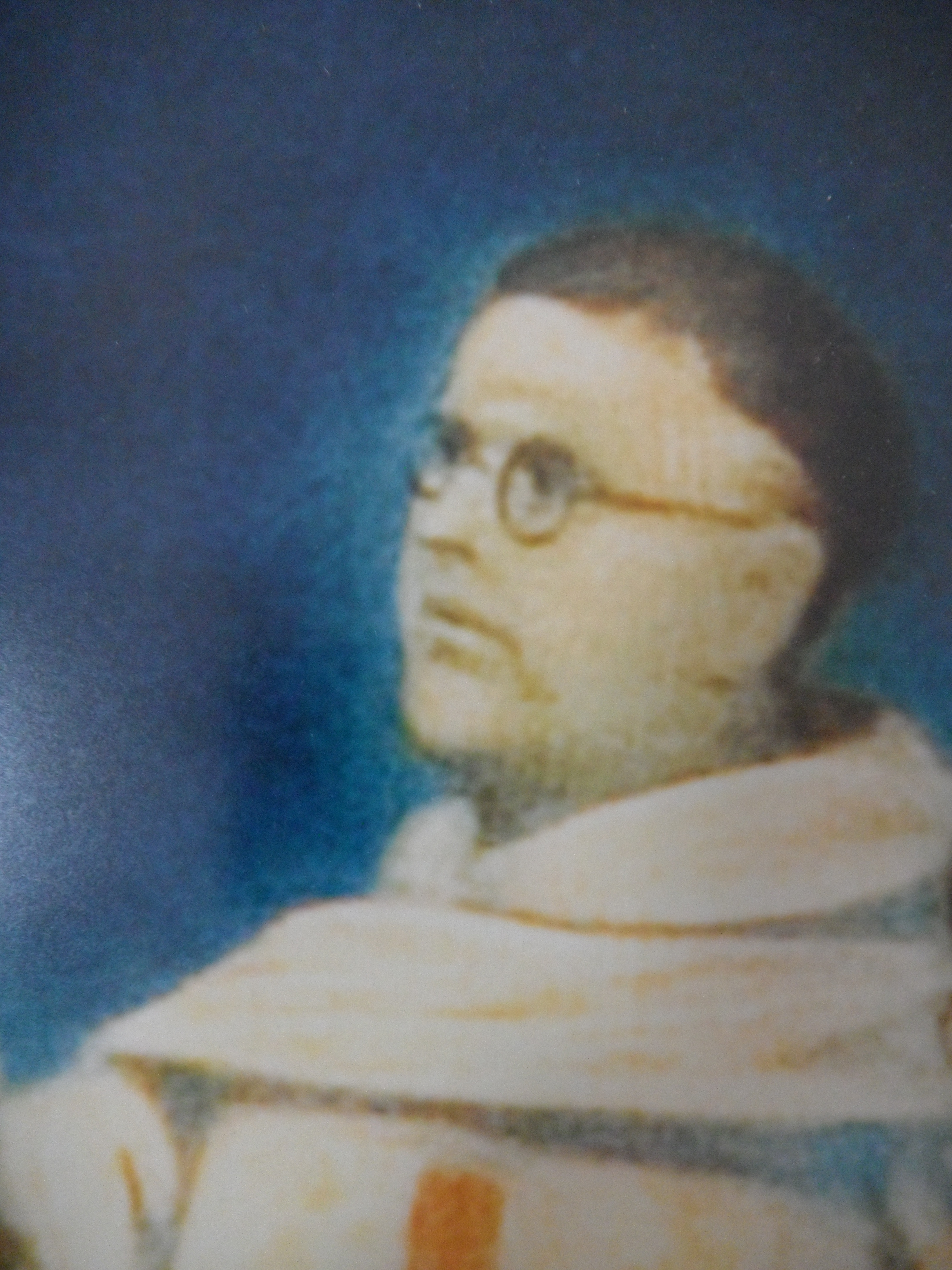 Particular del lienzo con motivo a la beatificación de Mariano de San José y compañeros mártires trinitarios. Convento de San Carlo alle Quattro Fontane.